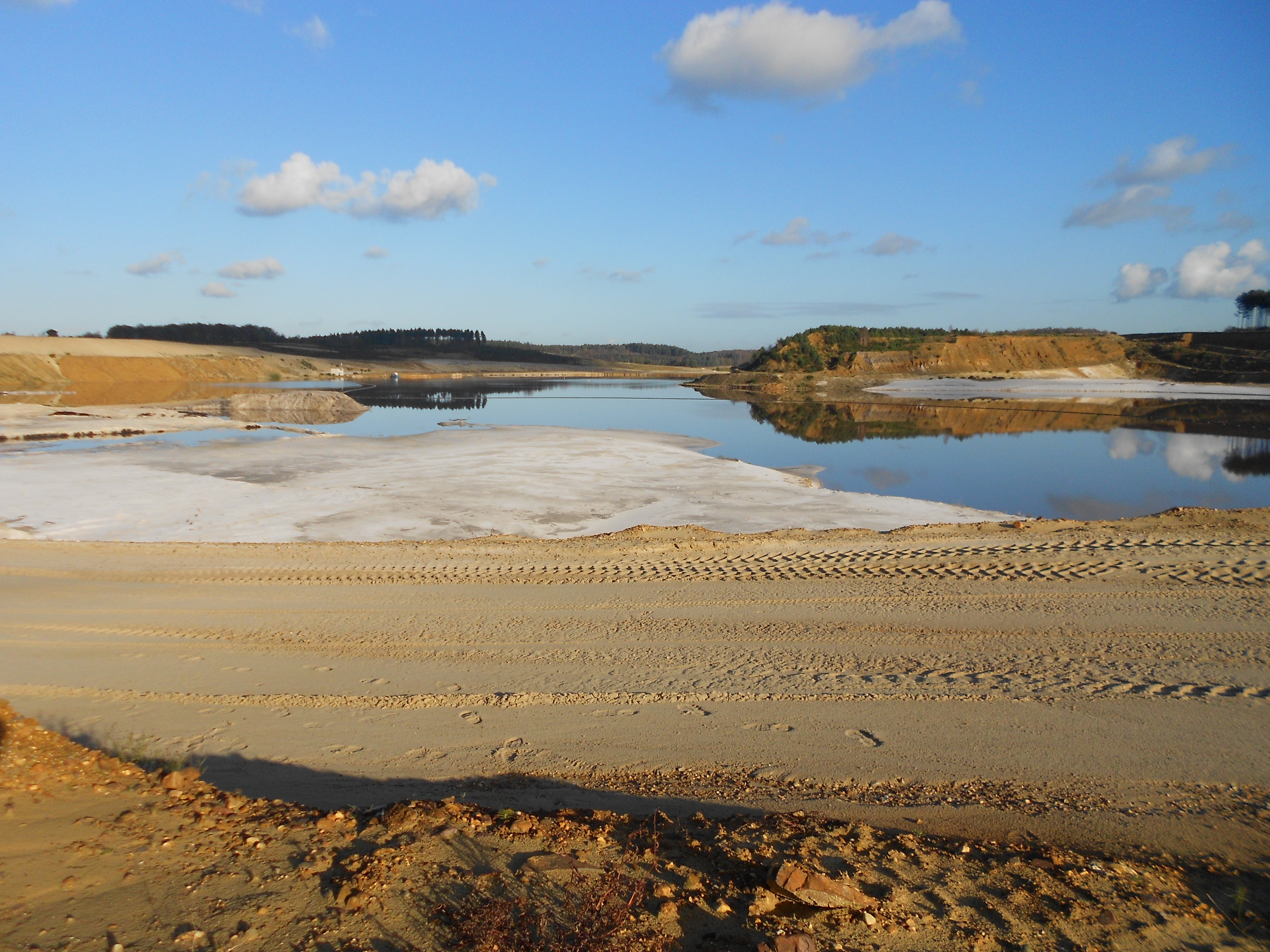 Nationaal Park Hoge Kempen - Zandgroeve